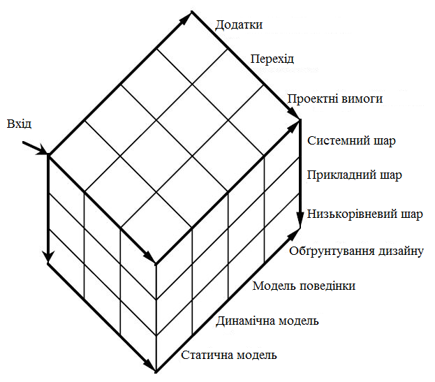 Розміри об'єктів проектування IDEF4